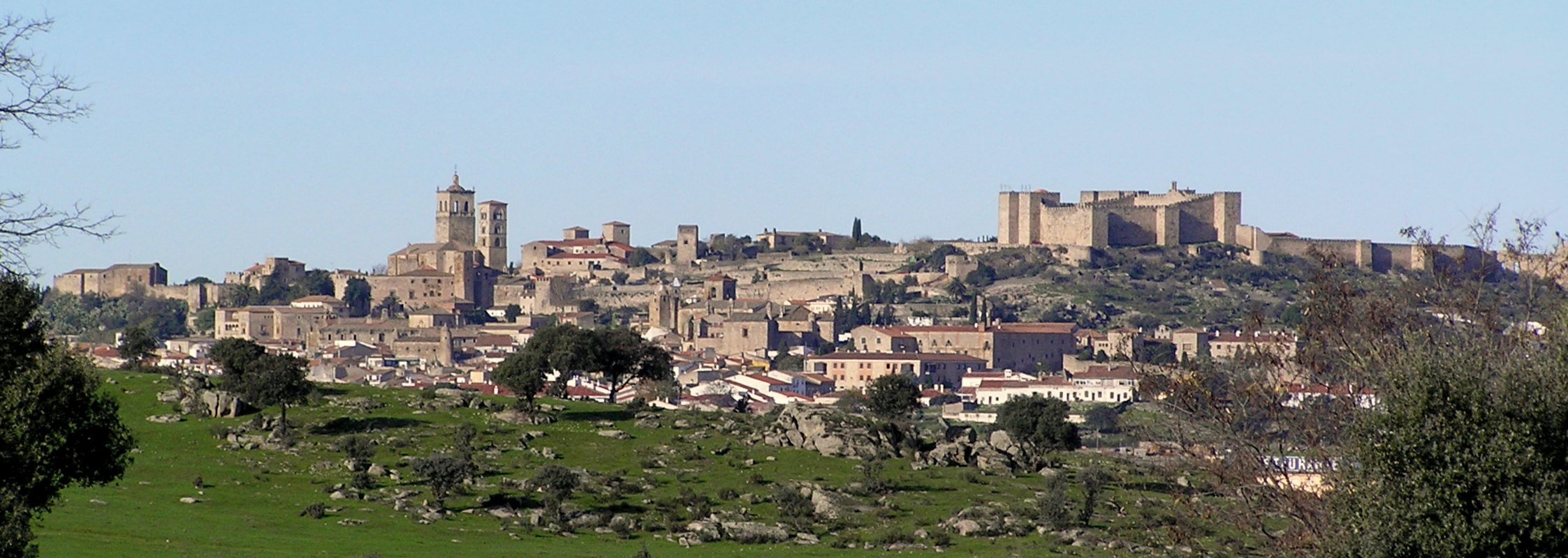 Vista panorámica de Trujillo